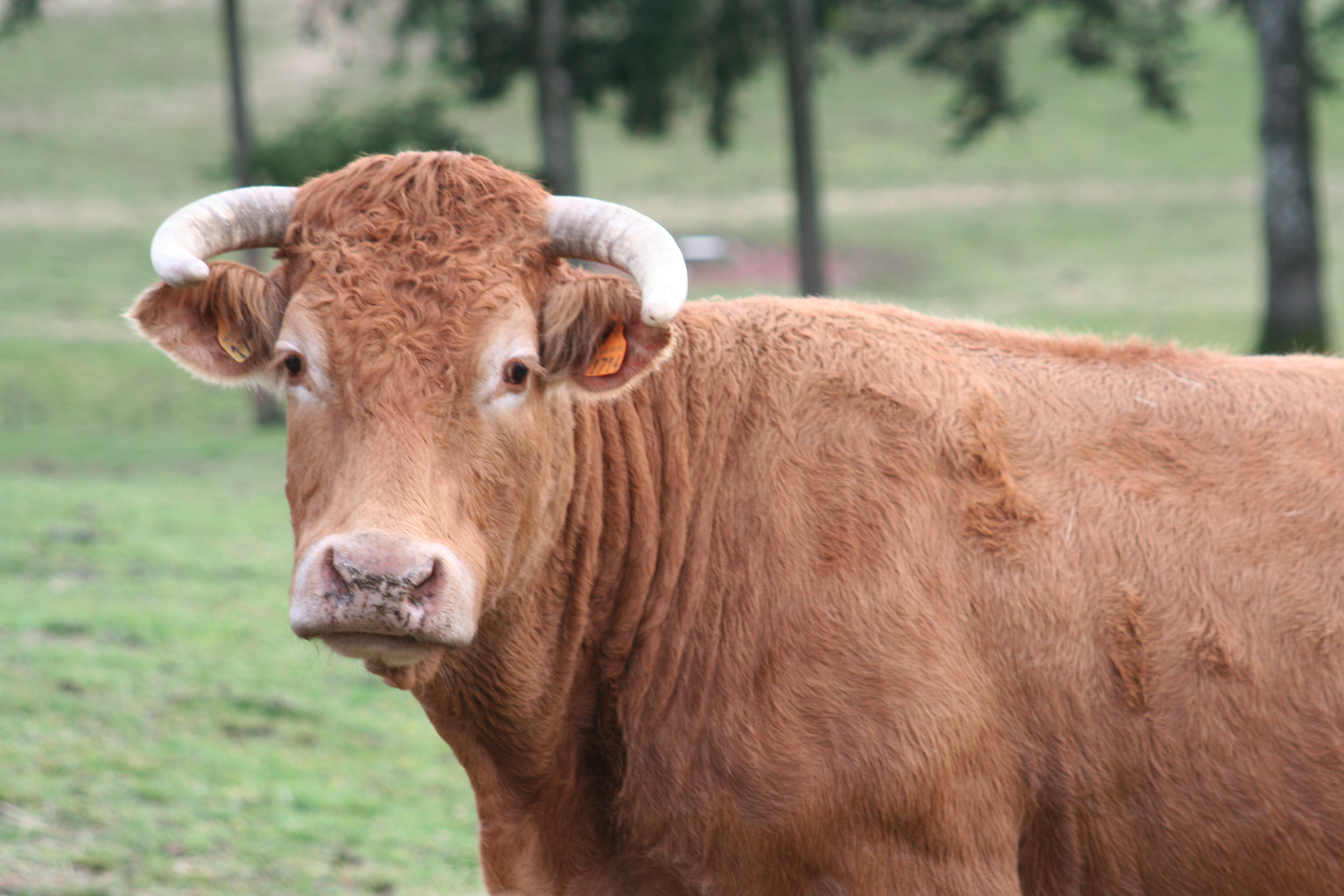 Vache de race Limousine : race bovine Limousine.